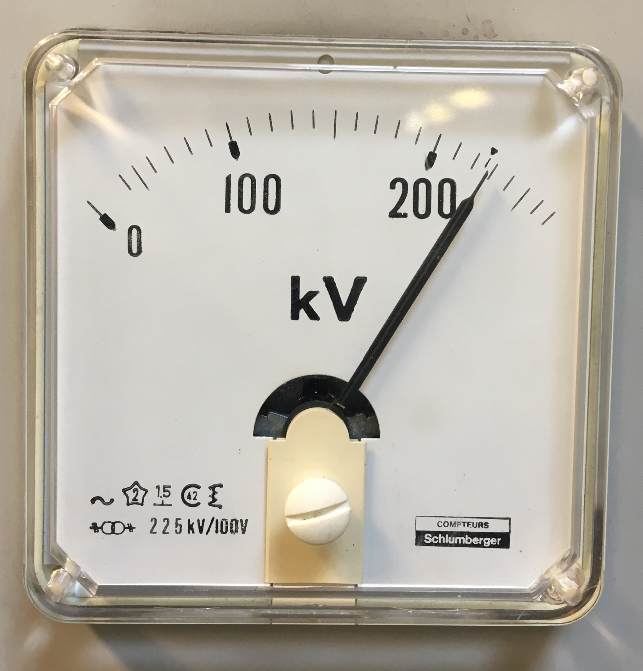 Voltmètre gradué en kV = kilovolt (mille volts). Voltmètre 225 kV d'un poste à haute tension de la Régie autonome des transports parisiens (RATP).